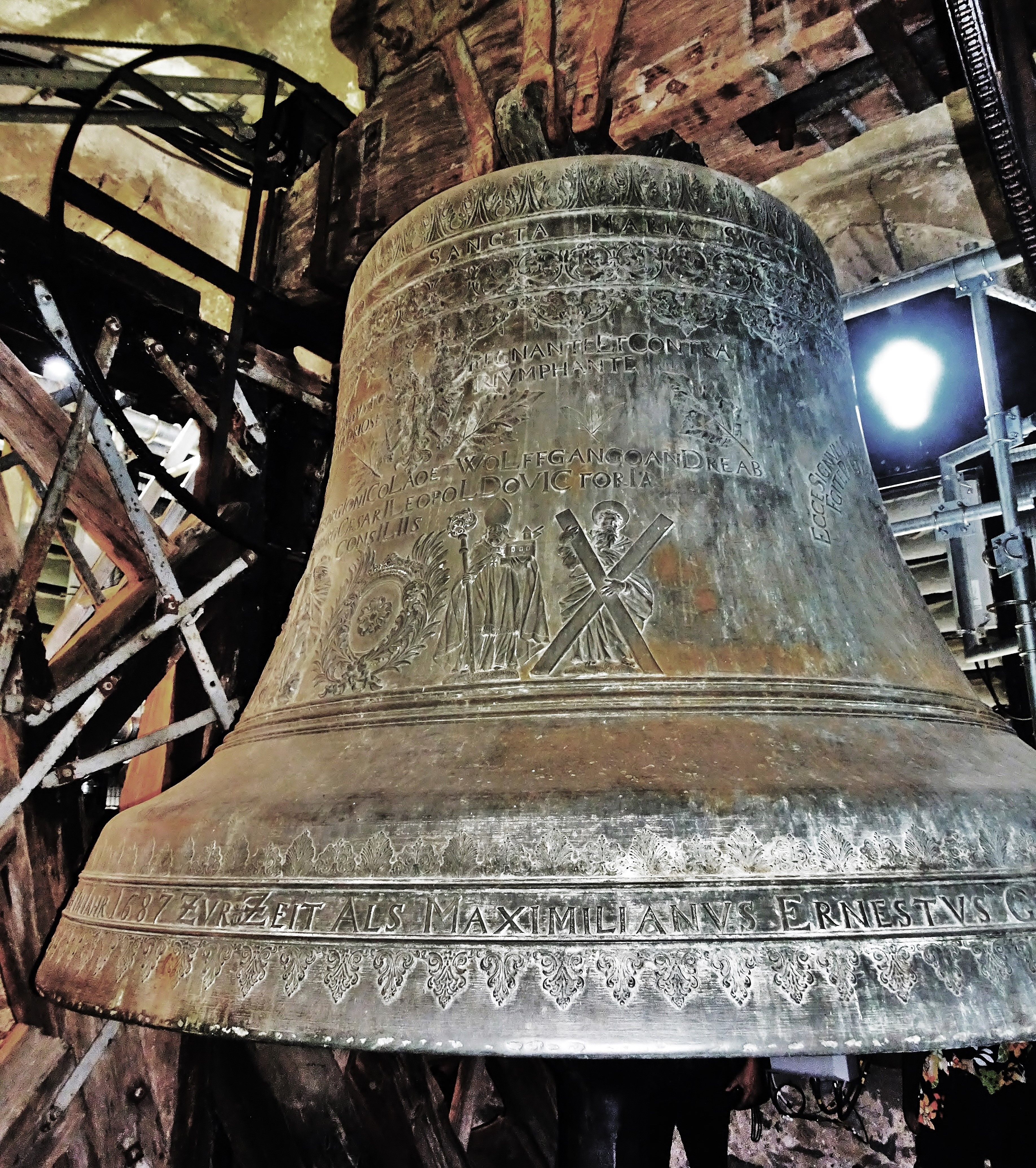 Wallfahrtskirche, Collegiat-Stiftskirche Maria Himmelfahrt Maria Saal, die große Glocke: "Maria Saalerin"